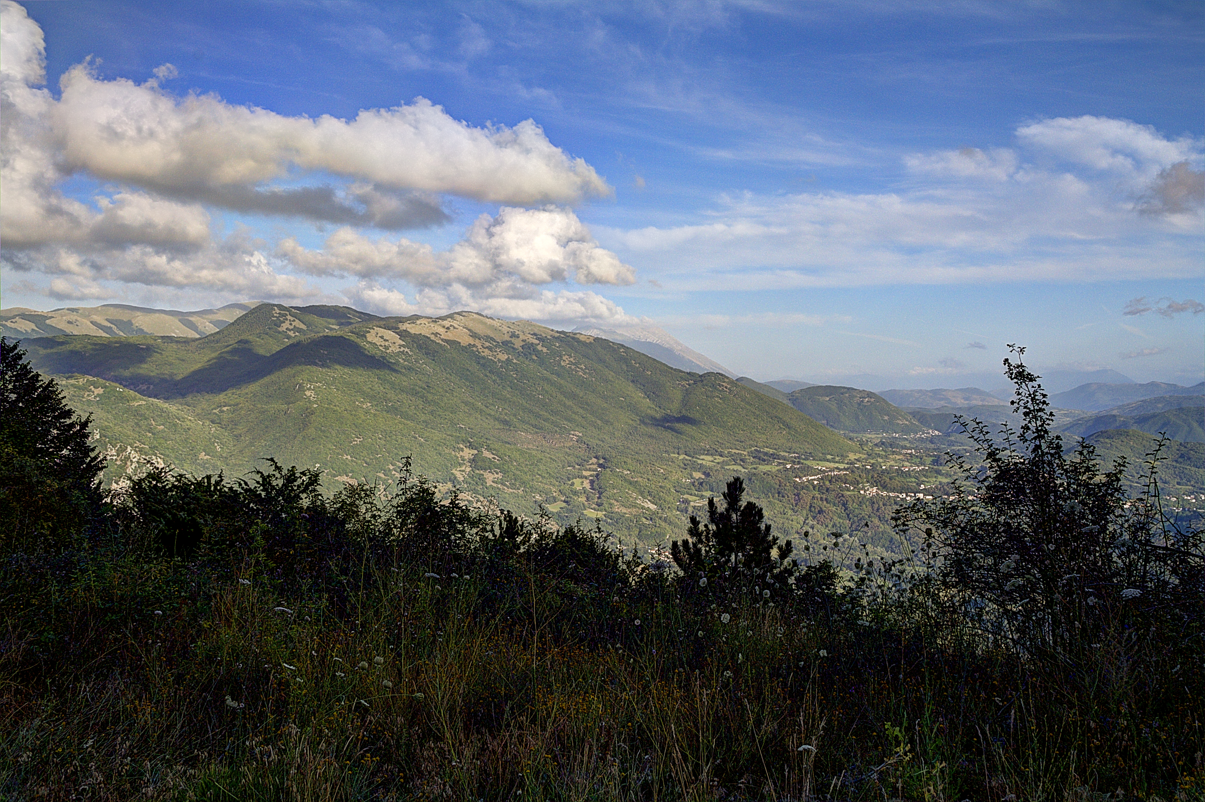 Versante Abruzzese del Cicolano Orientale - Catena del Monte Fratta vista dal Monte Serra